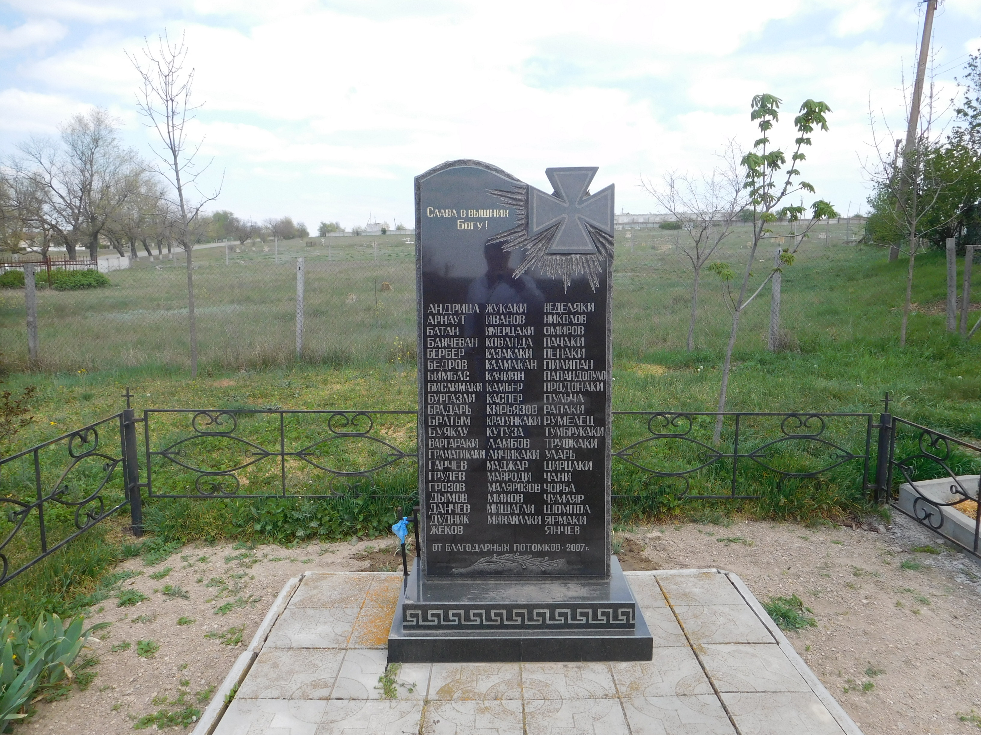 с. Іванове (Малий Буялик), Лиманський район, Одеська область